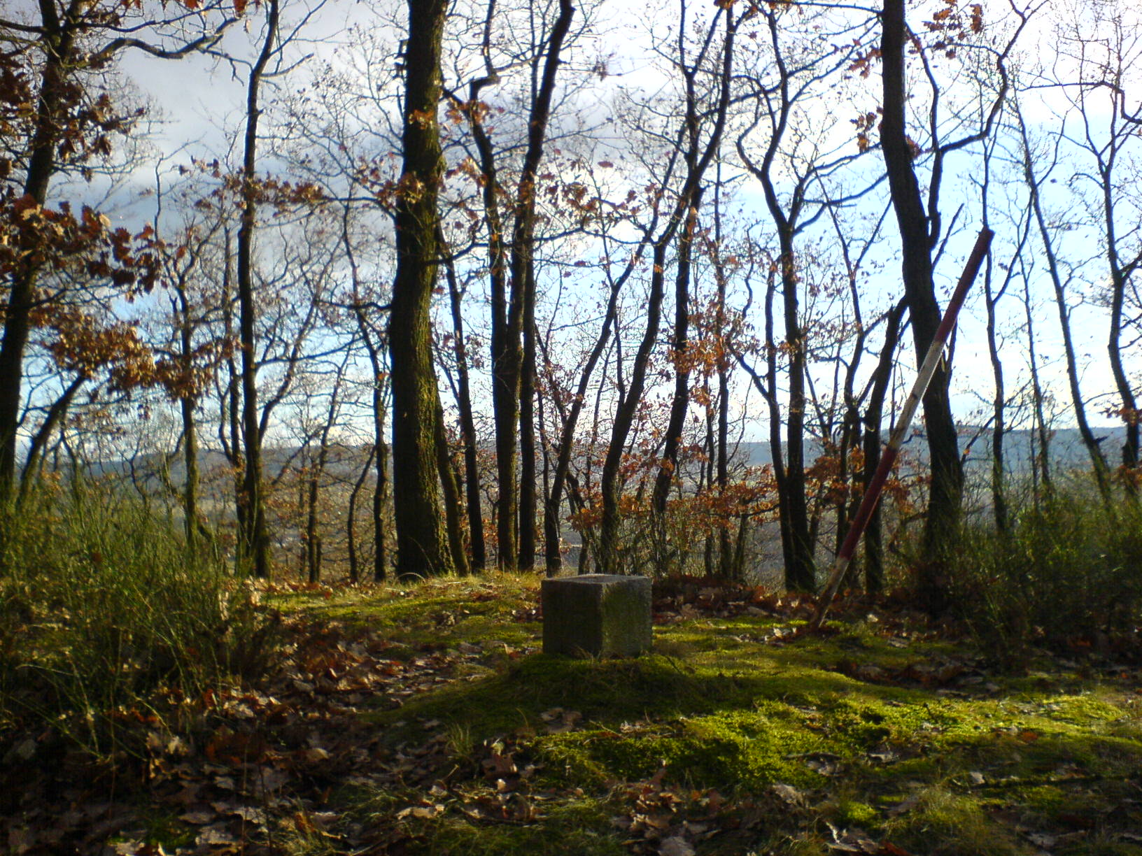 Česky: Vrchol Housiny (461 m n. m.)